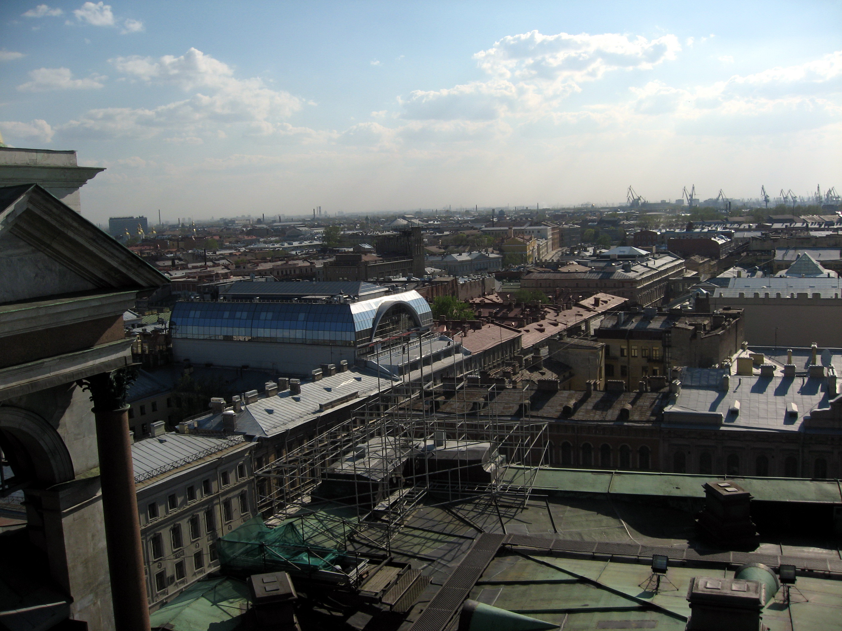 Sankt-Petěrburg, výhled z Katedrály svatého Izáka